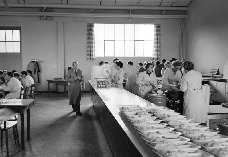 Nürnberg Grundig Radio-Werke Essensausgabe im Hauptwerk in Fürth. Die Betriebsangehörigen können hier ein verbilligtes warmes Mittagessen einnehmen.